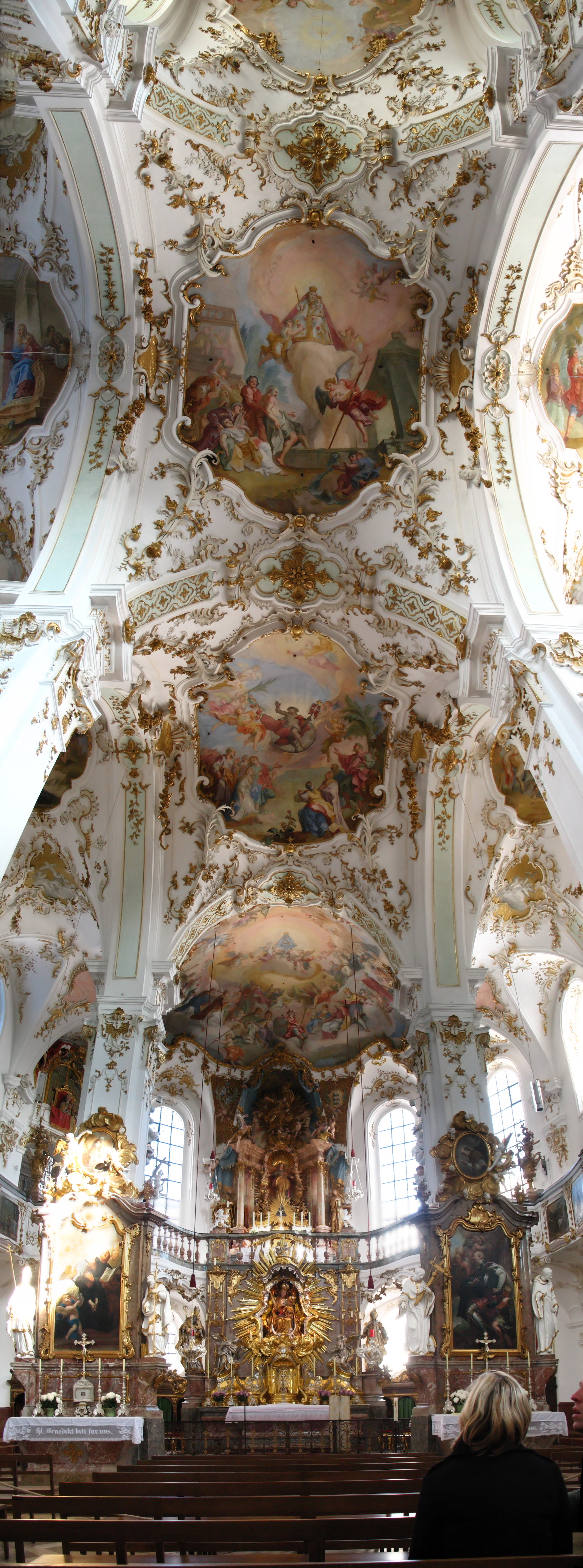 Kloster Andechs Panoramabild von Altar und Deckengemälden